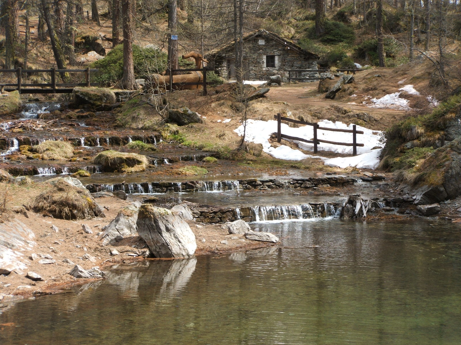 Boschi nei pressi di Rhêmes-Notre-Dame, Val d'Aosta